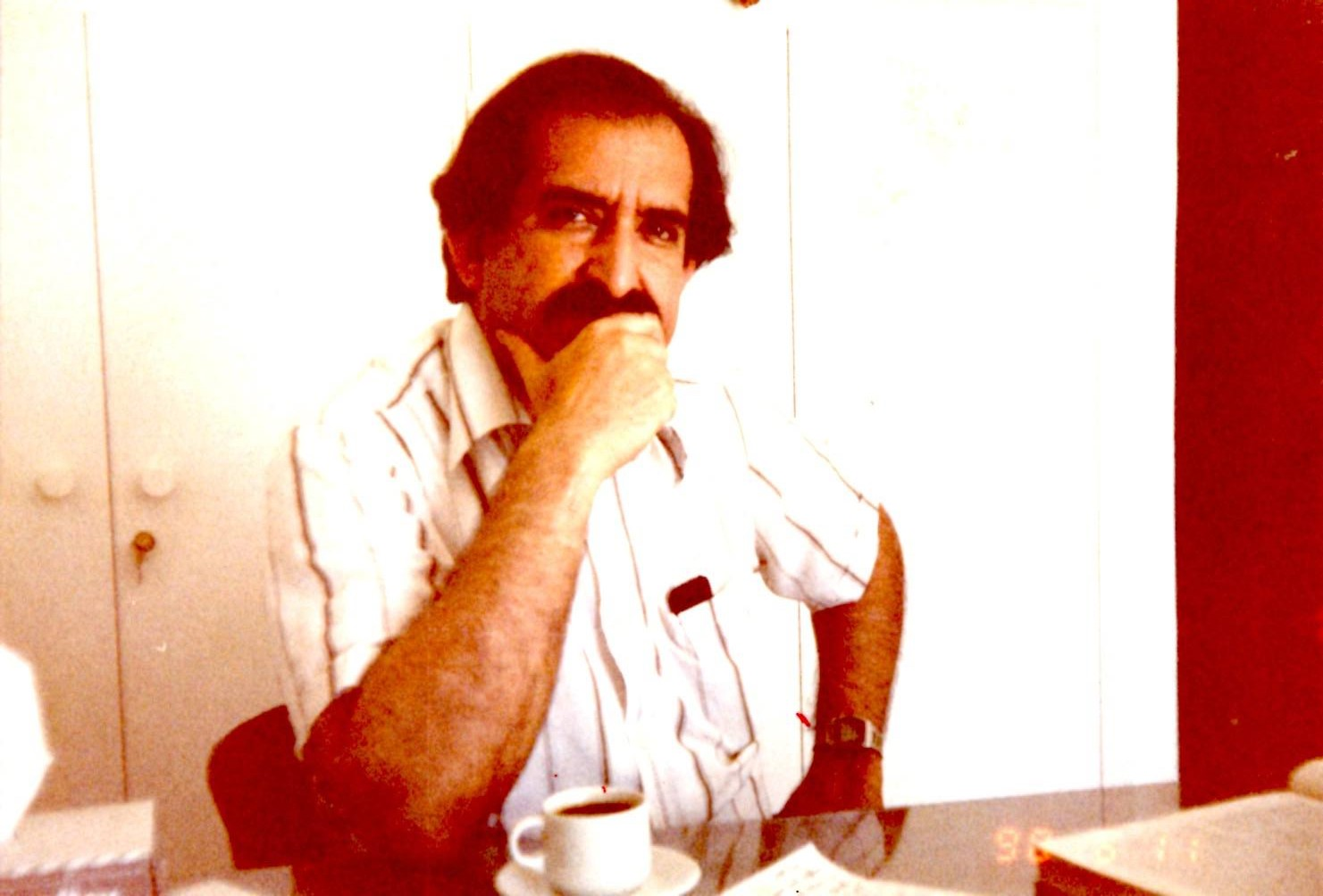 Խաժակ Տեր Գրիգորյան